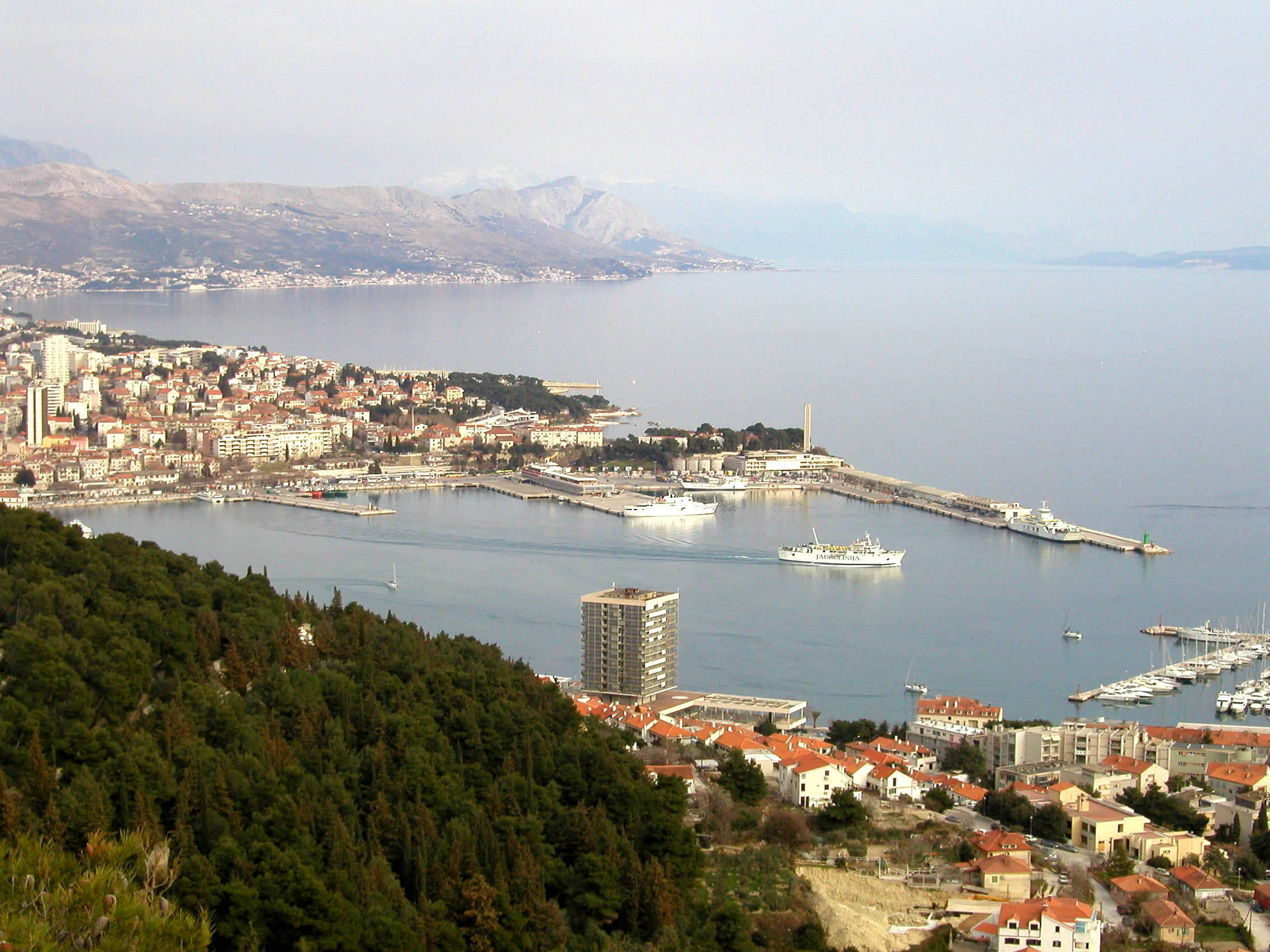 Split, Kroatien, Hafen. (für die GNU FDL)